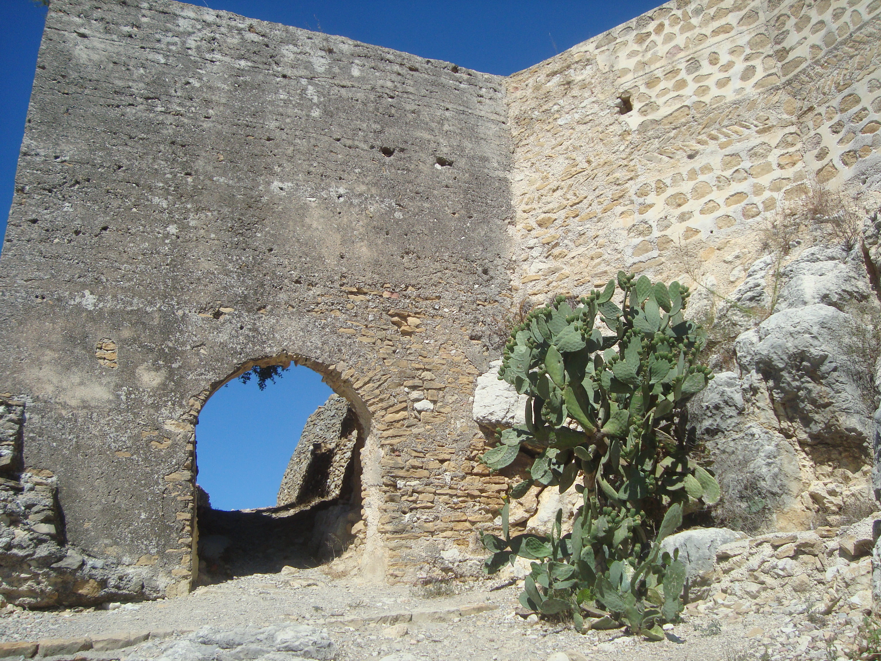 Castell de Cervera (Cervera del Maestrat)